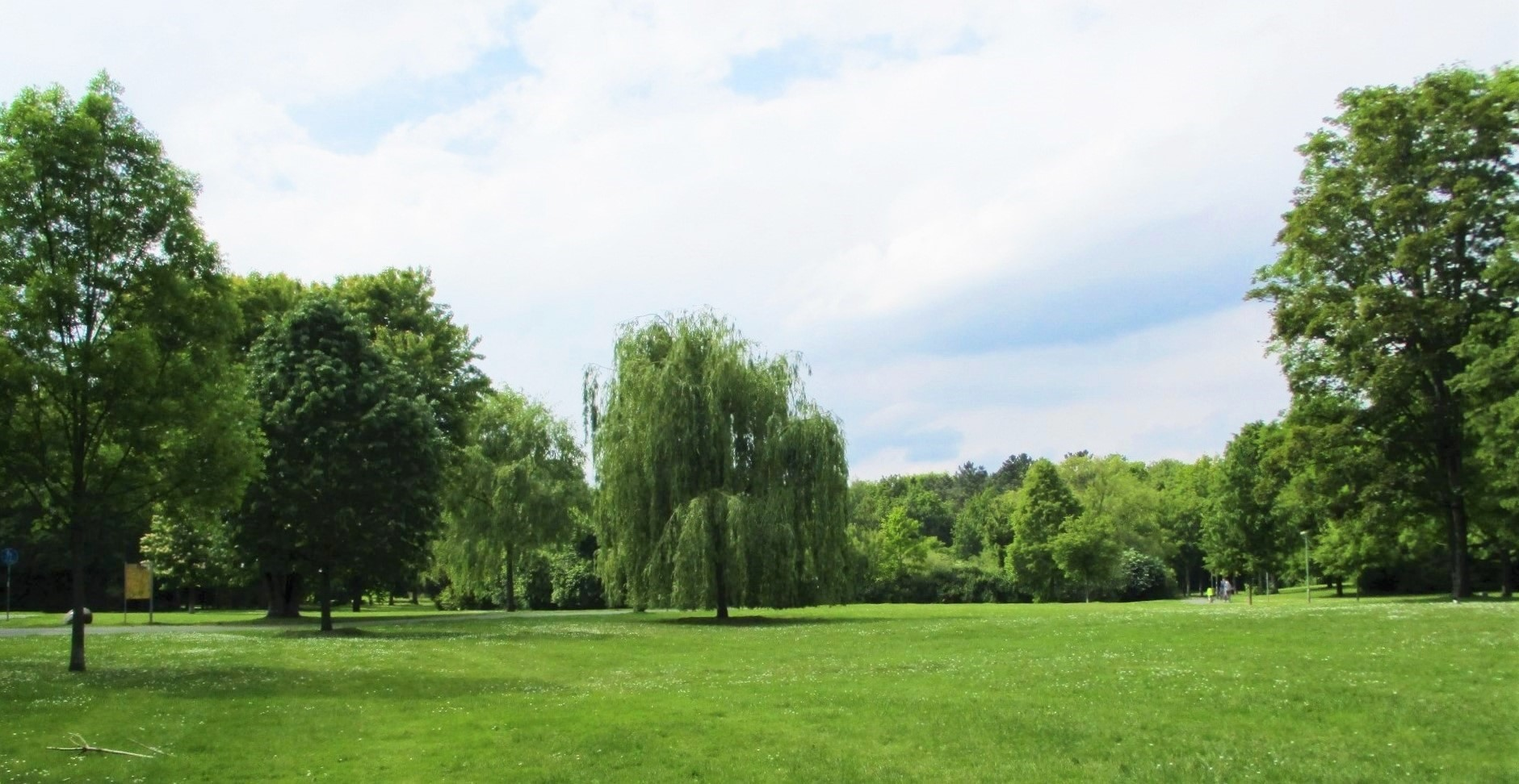 Martin-Luther-King-Park, Frankfurt am Main-Niederursel